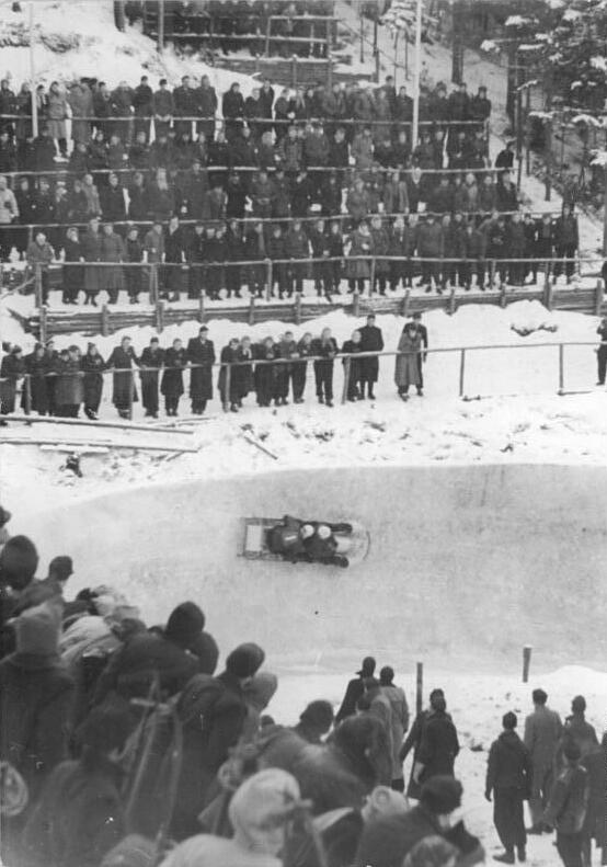 Oberhof, Wadeberg-Bobbahn, Erich Hansen, Oswald Schelter Zentralbild TBD-Schaar-Wlocka 29.1.1954 Bobmeisterschaften der Deutschen Demokratischen Republik Oberhof vom 27. bis 31.1.1954 Am 28.1.1954 wurde auf der Wadebergbobbahn die Meisterschaft im Zweier-Bob entschieden. Heiße Kämpfe gab es unter den Favoriten und jeder Bahnrekord, der aufgestellt wurde, konnte von dem nächsten Fahrer schon wieder gebrochen werden. Noch nie in der GEschichte der Wadeberg-Bobbahn in Oberhof sind die schweren Männer des Bobs so schnelle Zeiten gefahren wie an dem Tage der Meisterschaft 1954. UBz: Bob DDR I Hansen-Schelter in der Schaukurve.